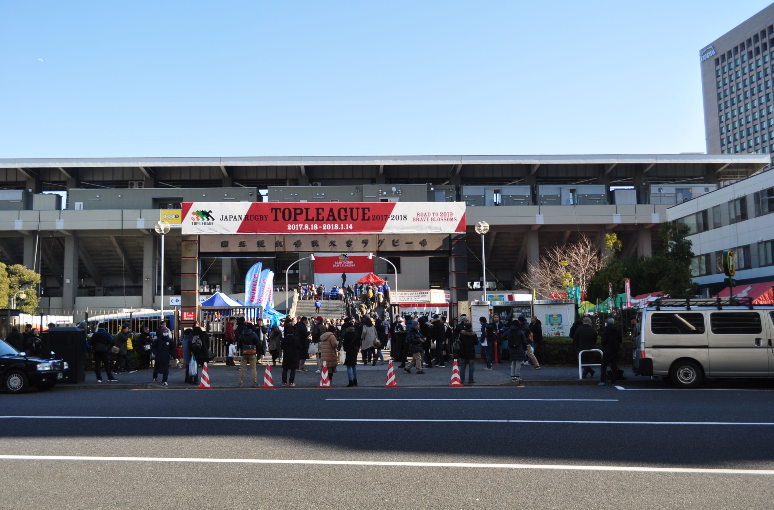 秩父宮ラグビー場